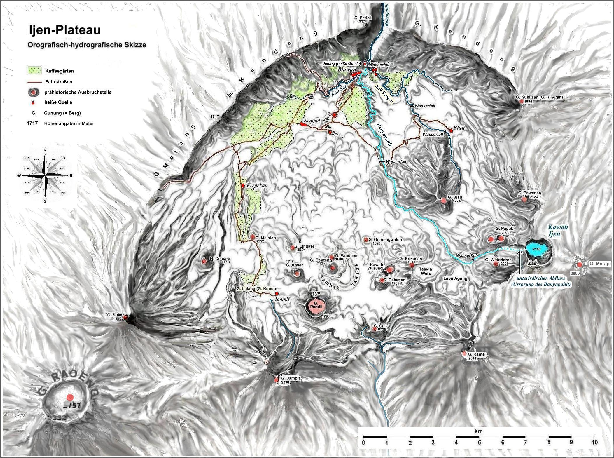 Ijen-Plateau mit prähistorischen Ausbruchstellen